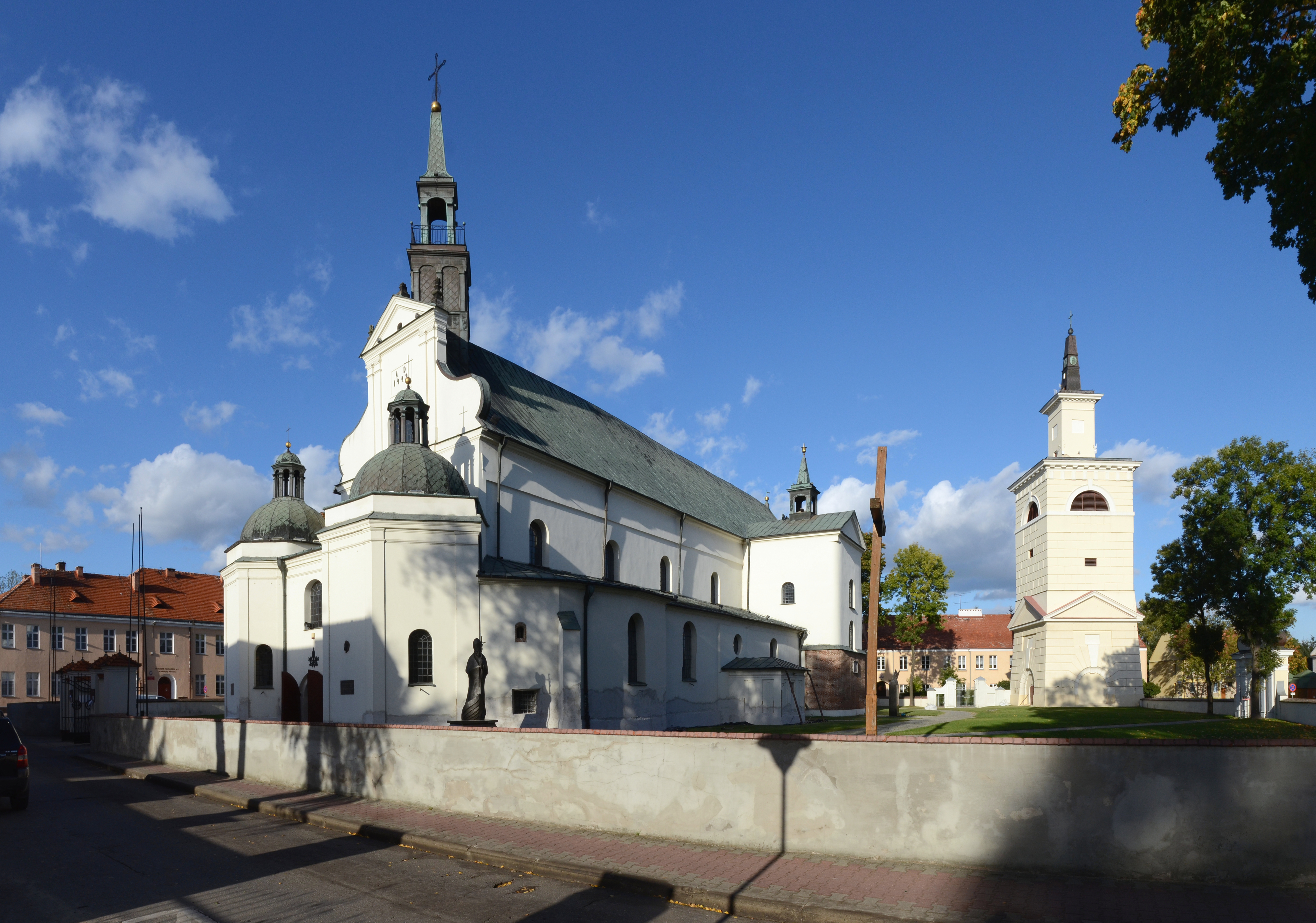 Bazylika kolegiacka Zwiastowania Najświętszej Maryi Panny w Pułtusku